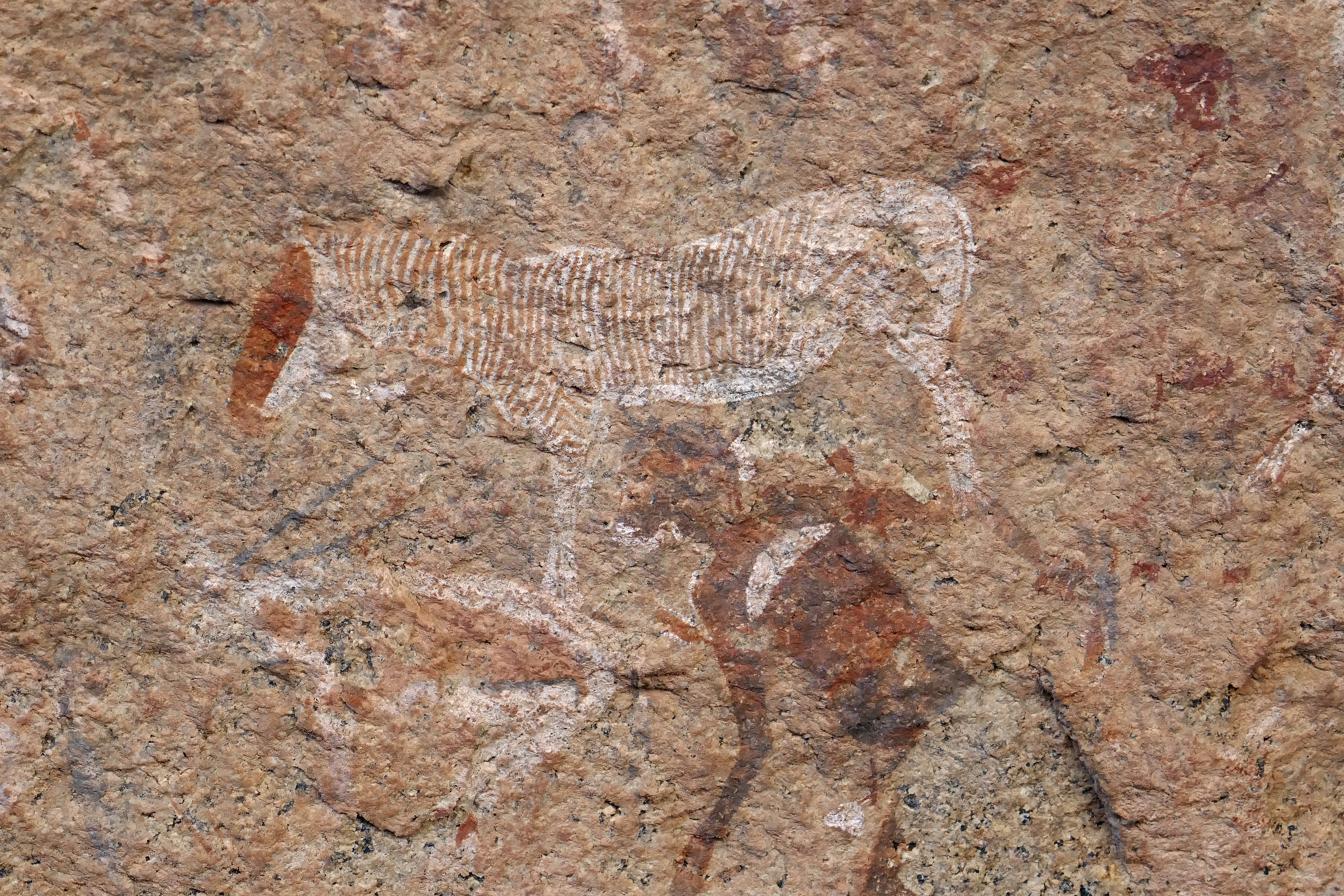 Peintures rupestres San (appartenant à la fresque connue sous le nom de White Lady) dans le massif du Brandberg en Namibie. Un zèbre des montagnes.